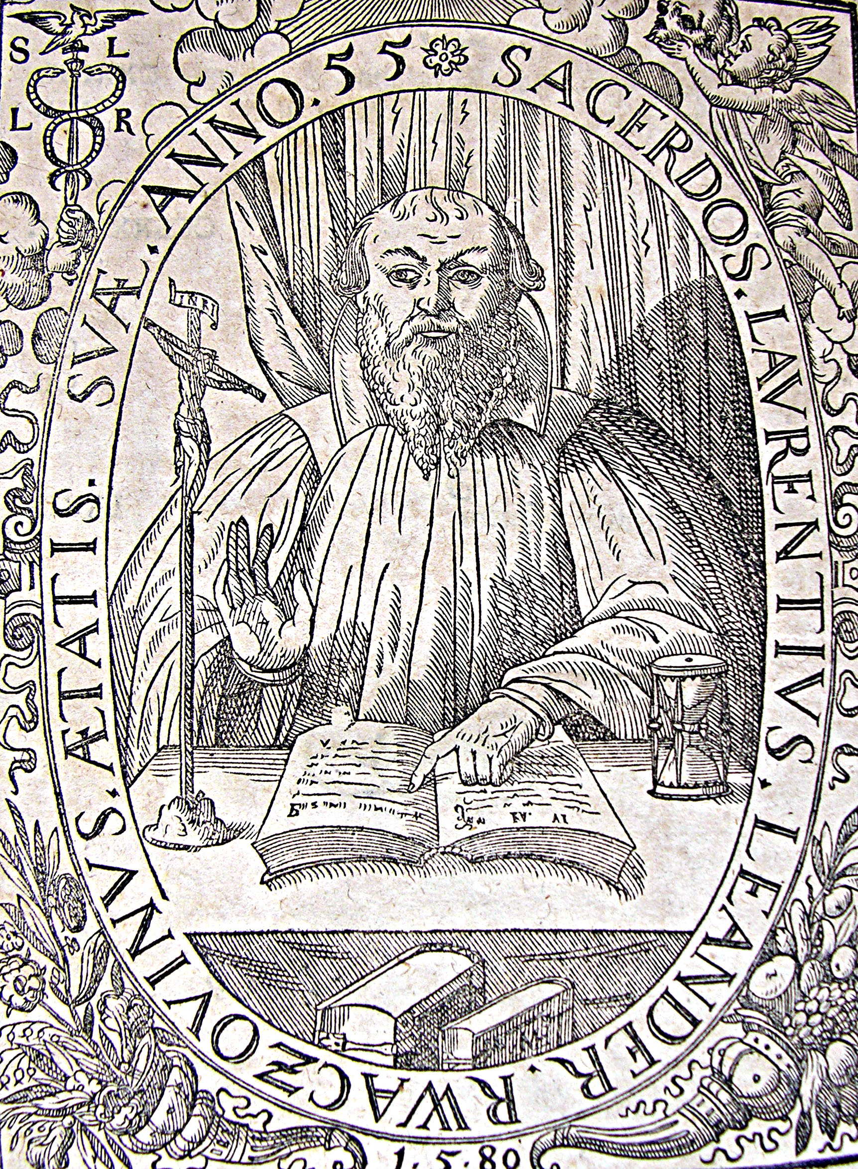 Vavřinec Leander Rvačovský ze Rvačova, portrét, Massopust, strana 301v